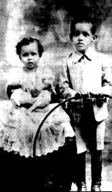 Cartola, compositor brasileiro aos 4 anos de idade, com Sebastião Jr. (Biela), no Catete